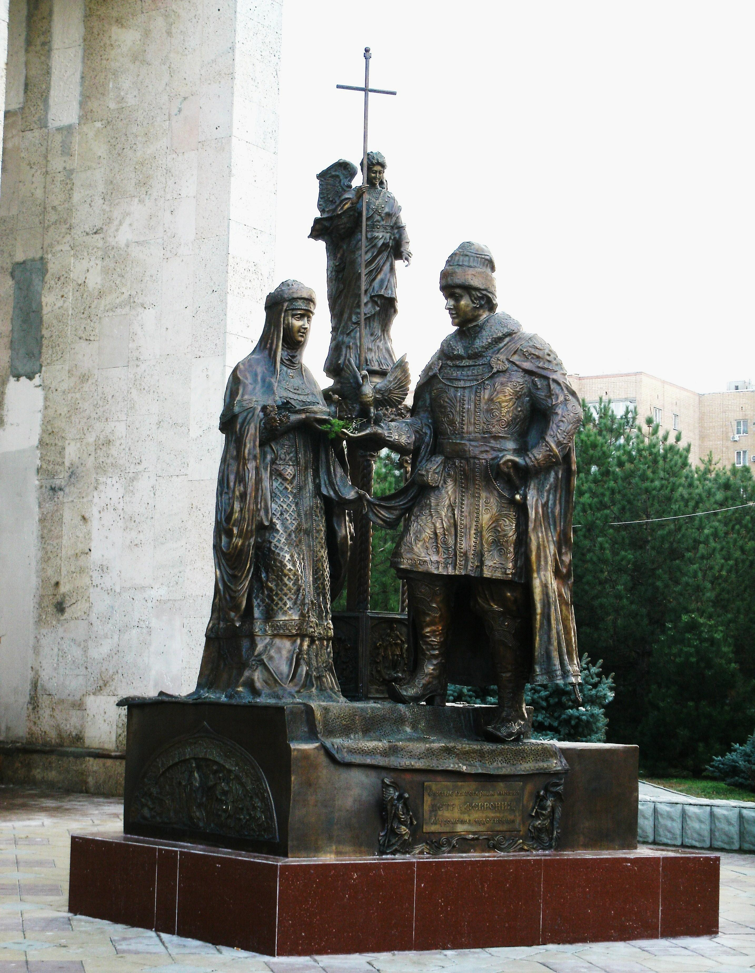 Памятник святым Петру и Февронии, Батайск